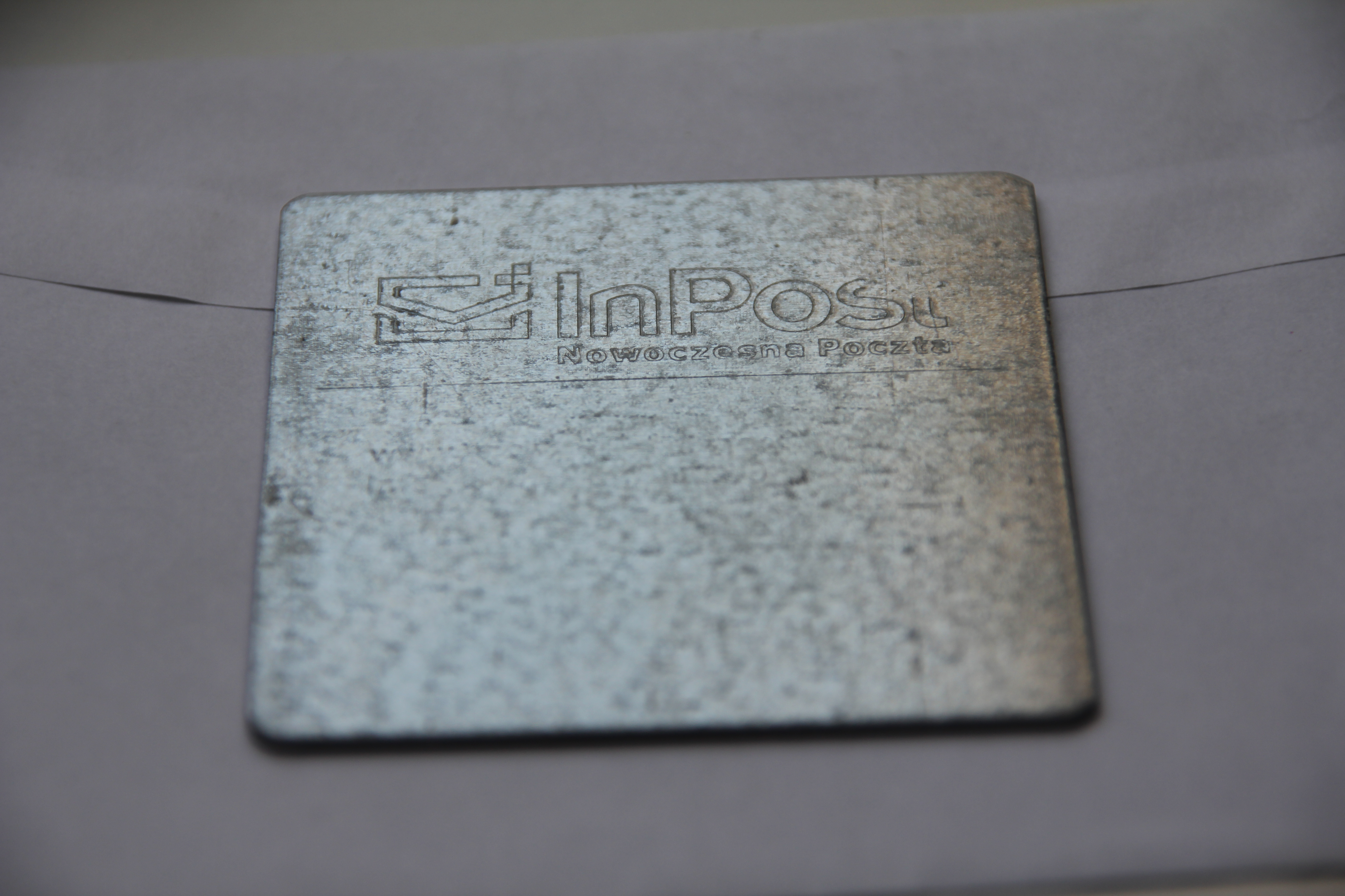 InPost blaszka dociążająca do 50 g